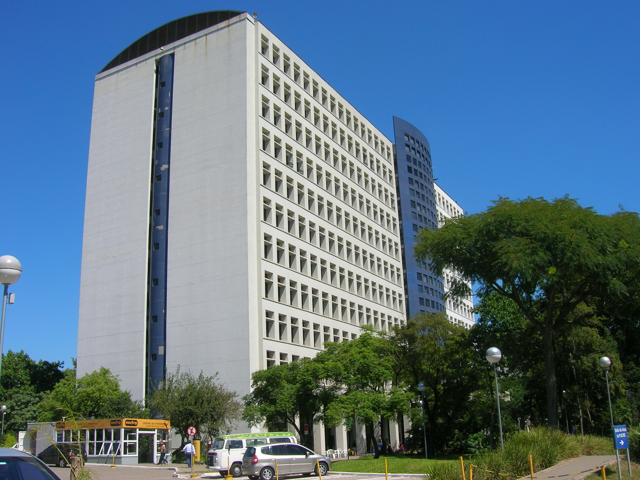 O Prédio 50 da Pontifícia Universidade Católica do Rio Grande do Sul (PUCRS), que abriga a Faculdade de Administração, Contabilidade e Economia (FACE).